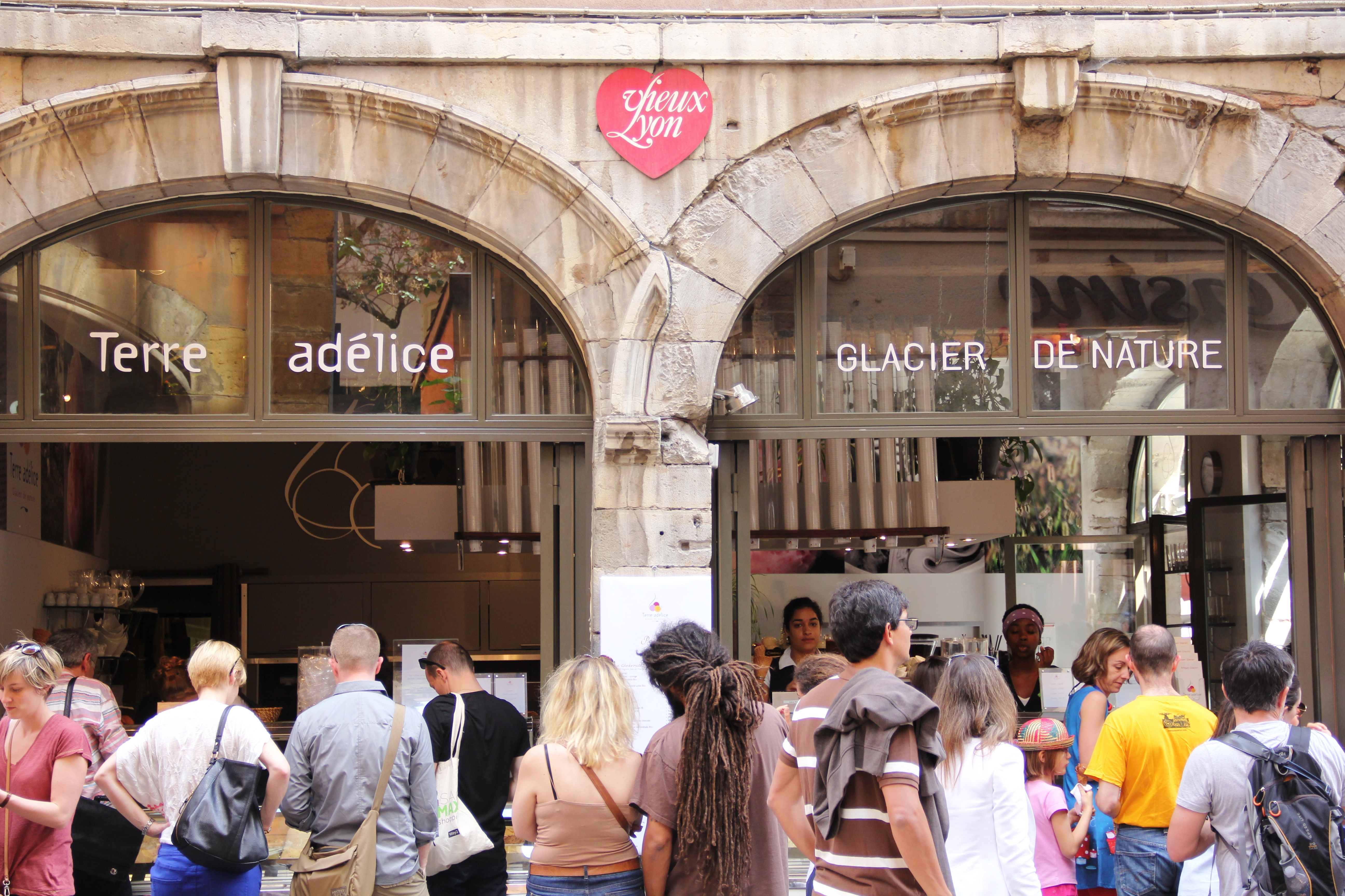 Le glacier Terre Adélice à Lyon, à l'angle de la rue Saint Jean et de la place de la Baleine.